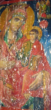 Икона на Боородица во црквата „Рождество на Пресвета Богородица“ во велешко Согле